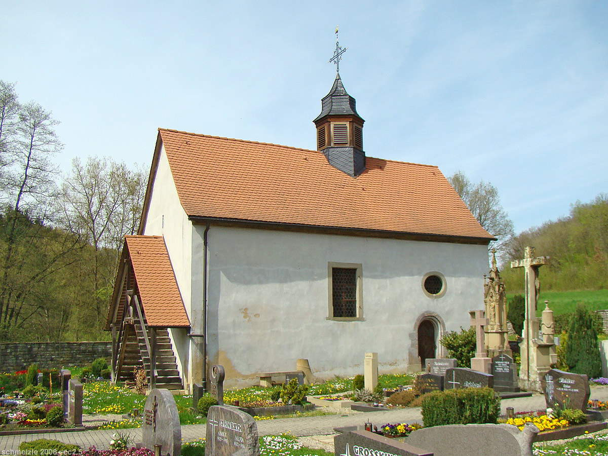 Friedhofskapelle in Allfeld